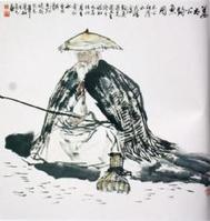 Jiang Ziya